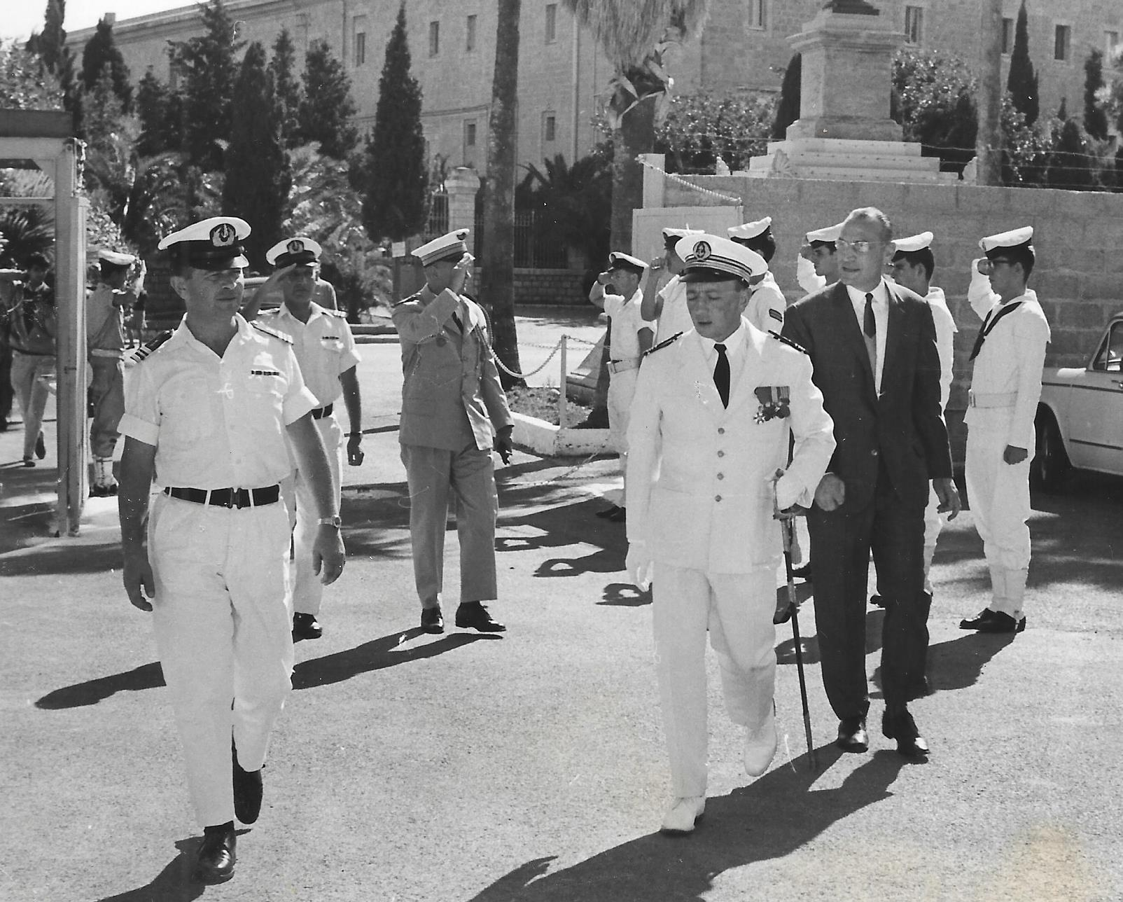 סרן מייק גל מלווה אדמירל צרפתי בביקור במפקדת חיל הים בסטלה מאריס 1966